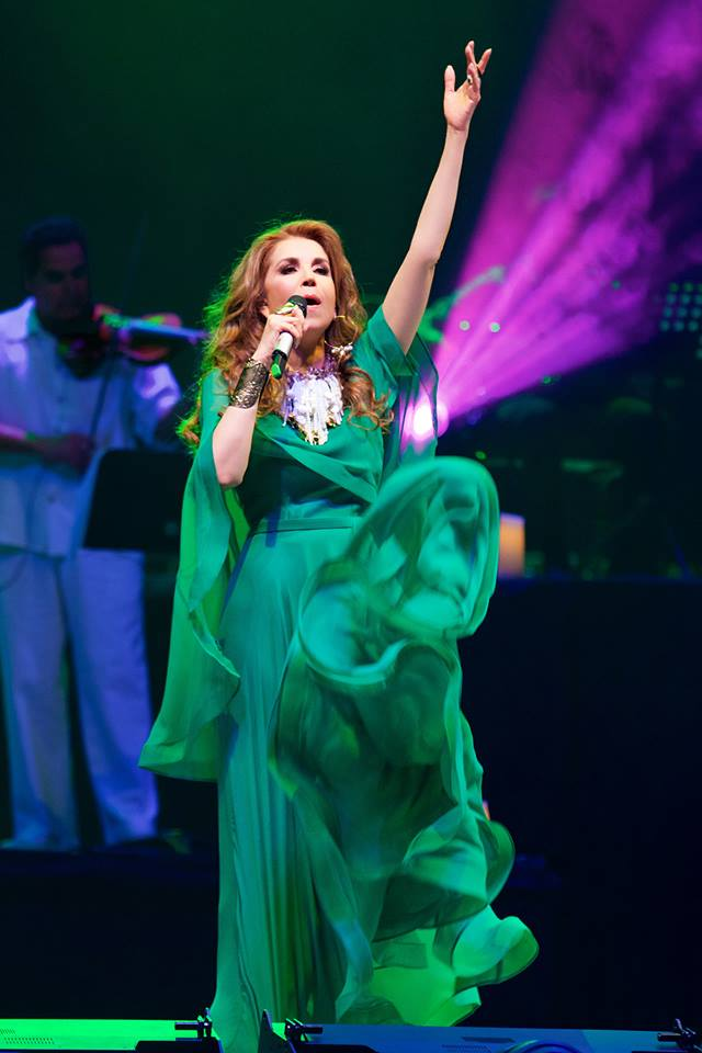 Cantante Guadalupe Pineda en concierto. Auditorio Nacional de México.